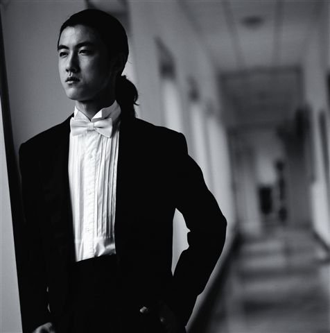 Hai’ou Zhang